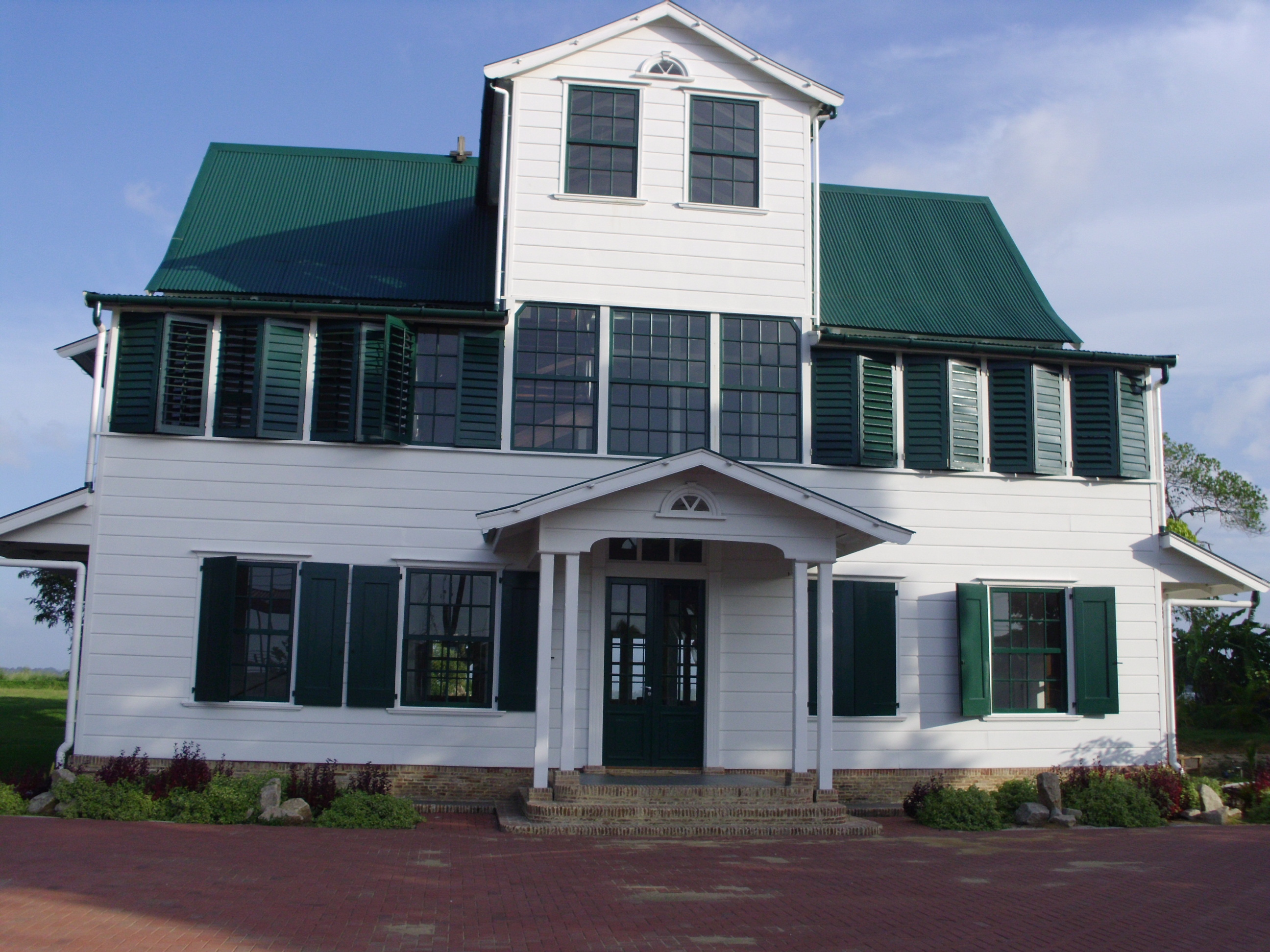 Dit is het hersteld plantagehuis Geyersvlijt gelegen aan de Anton Dragentenweg anno 2015.